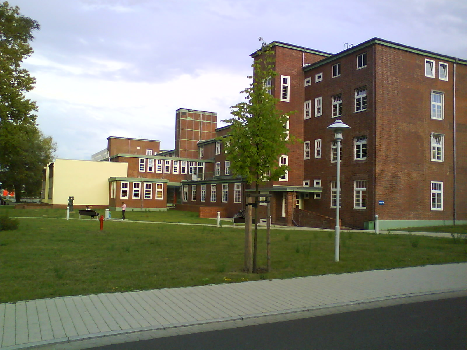 Kinderklinik der uni magdeburg